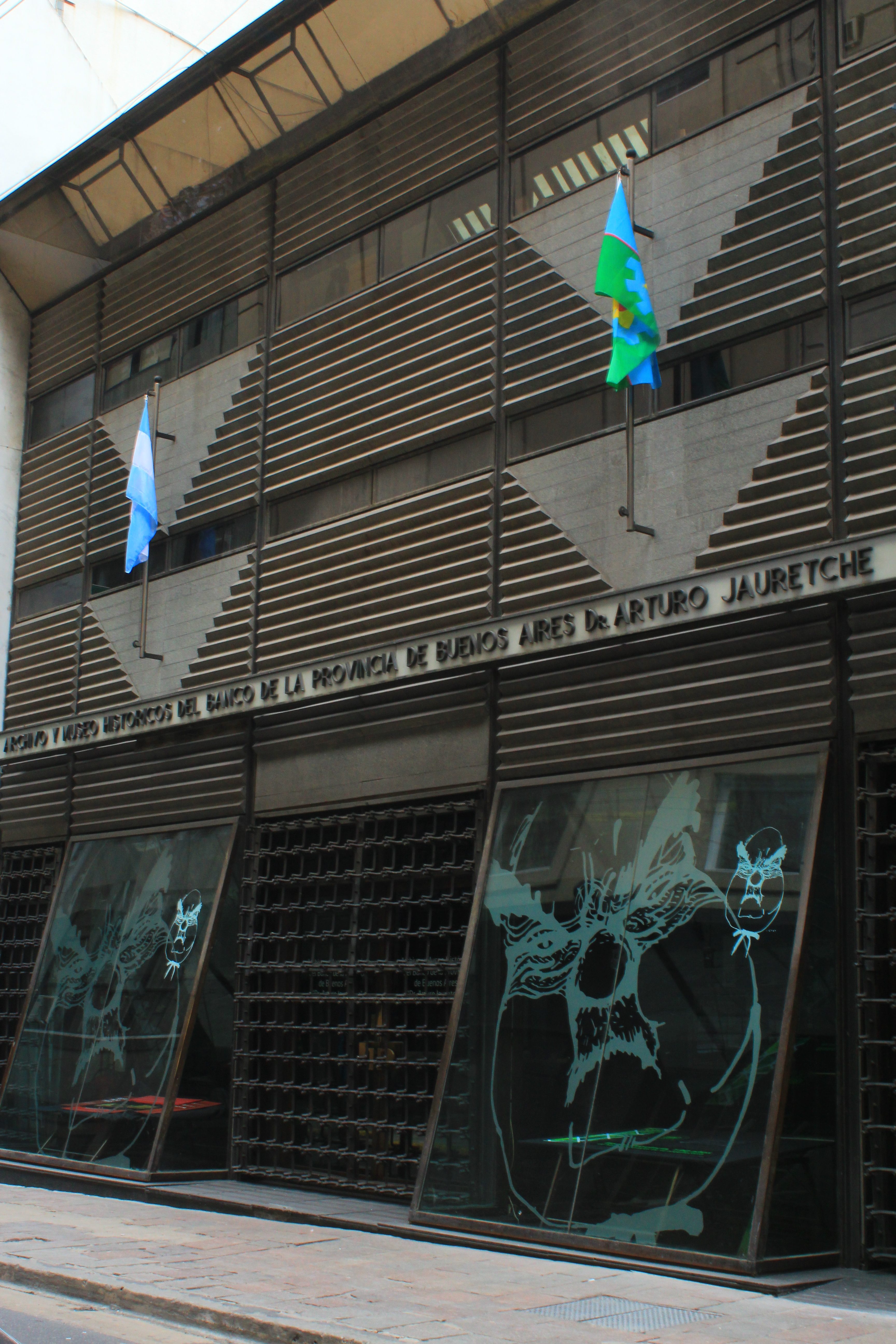 Archivo y Museo Históricos del Banco de la Provincia de Buenos Aires, "Dr. Arturo Jauretche"